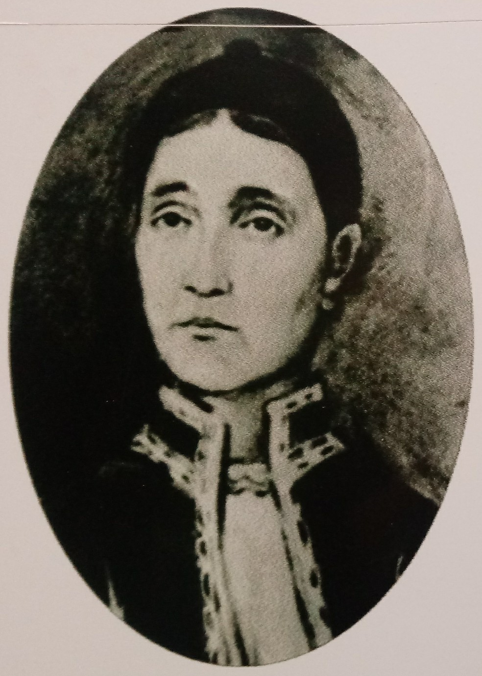 Portrait of Maria Sirkova (c. 1840 - 1911) in Vasil Levski Museum, Lovech